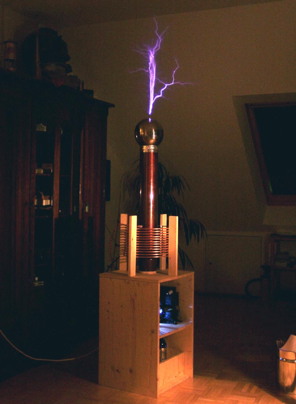 Teslaspule in Betrieb (Speisung mit 10 KV von zwei 400W Neontransformatoren)